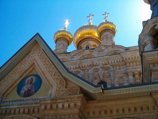 Saint Mary Magdalene Church (Jerusalem)